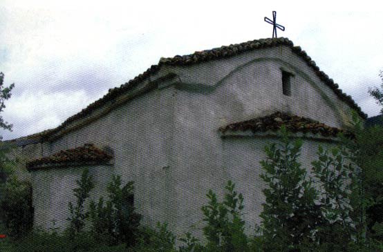 Църквата "Свети Николай" след ремонт и реставрация през 80-те години на 20-ти век.